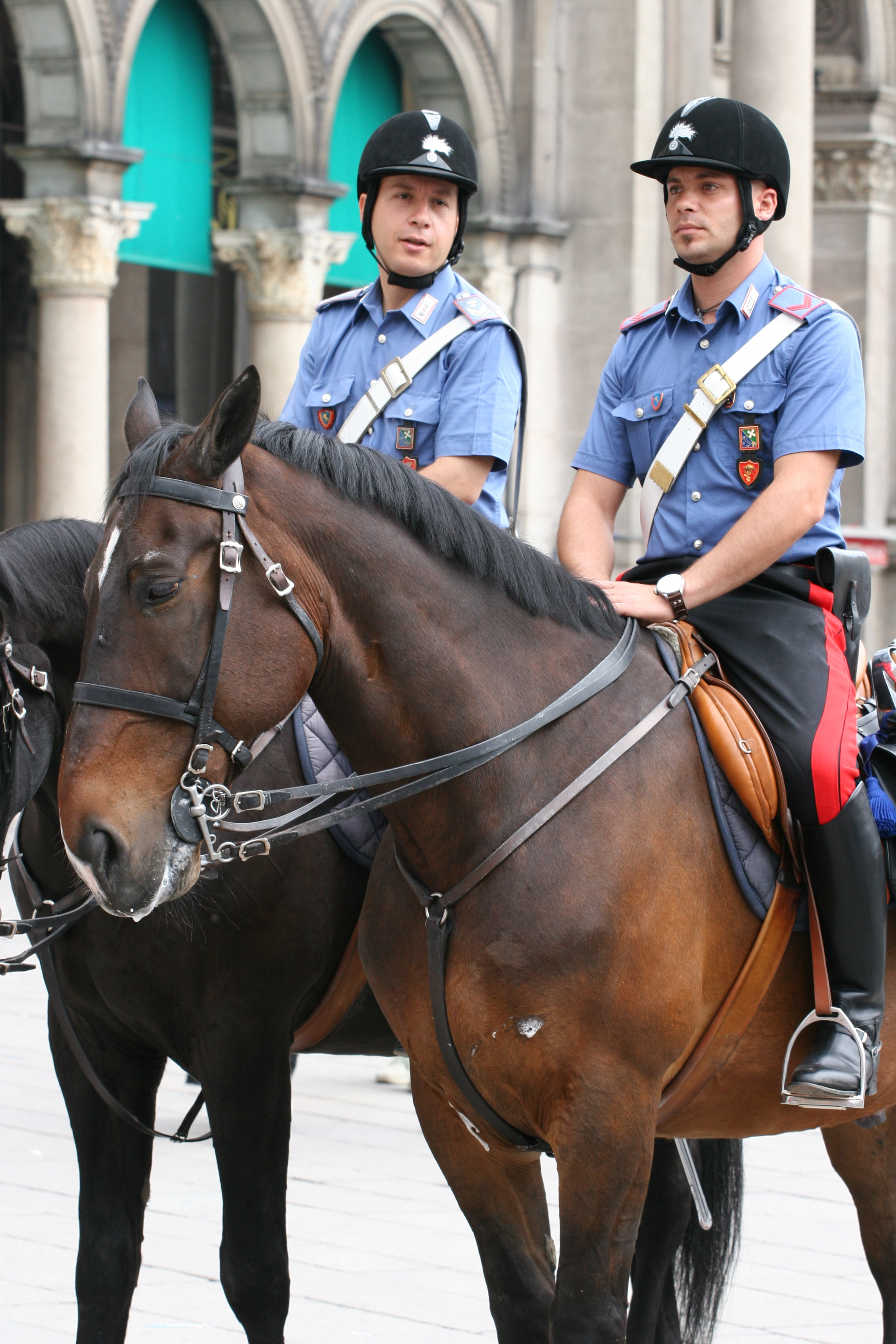 Carabinieri a cavallo.